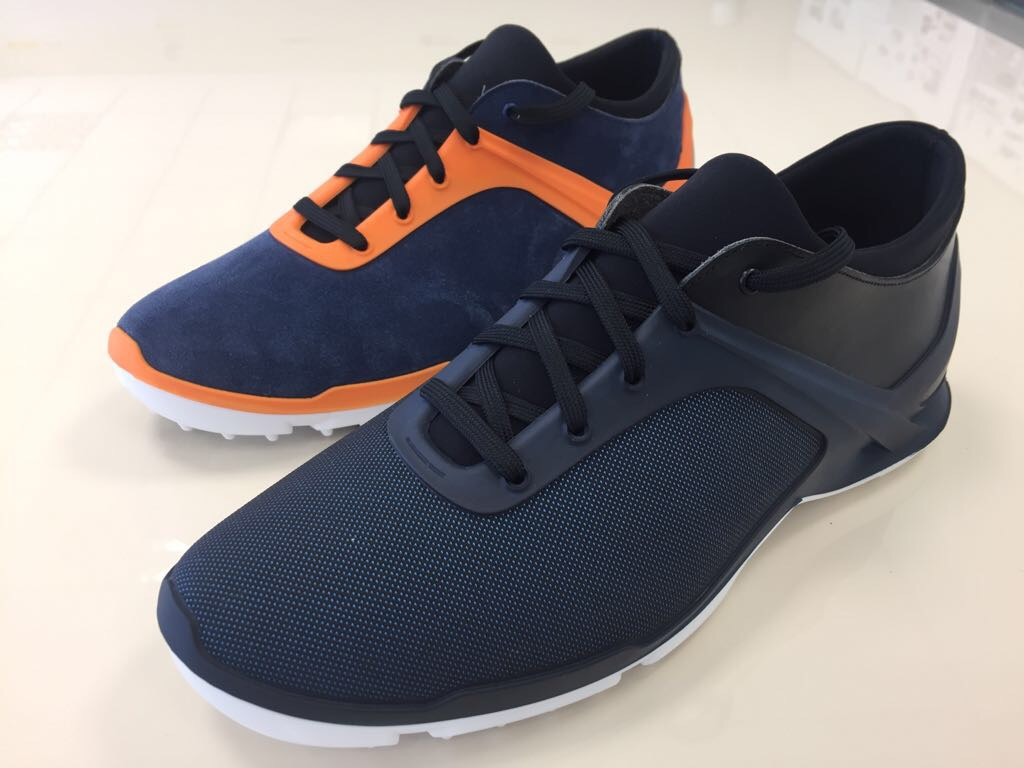 Imagen de calzado unido tridimensionalmente